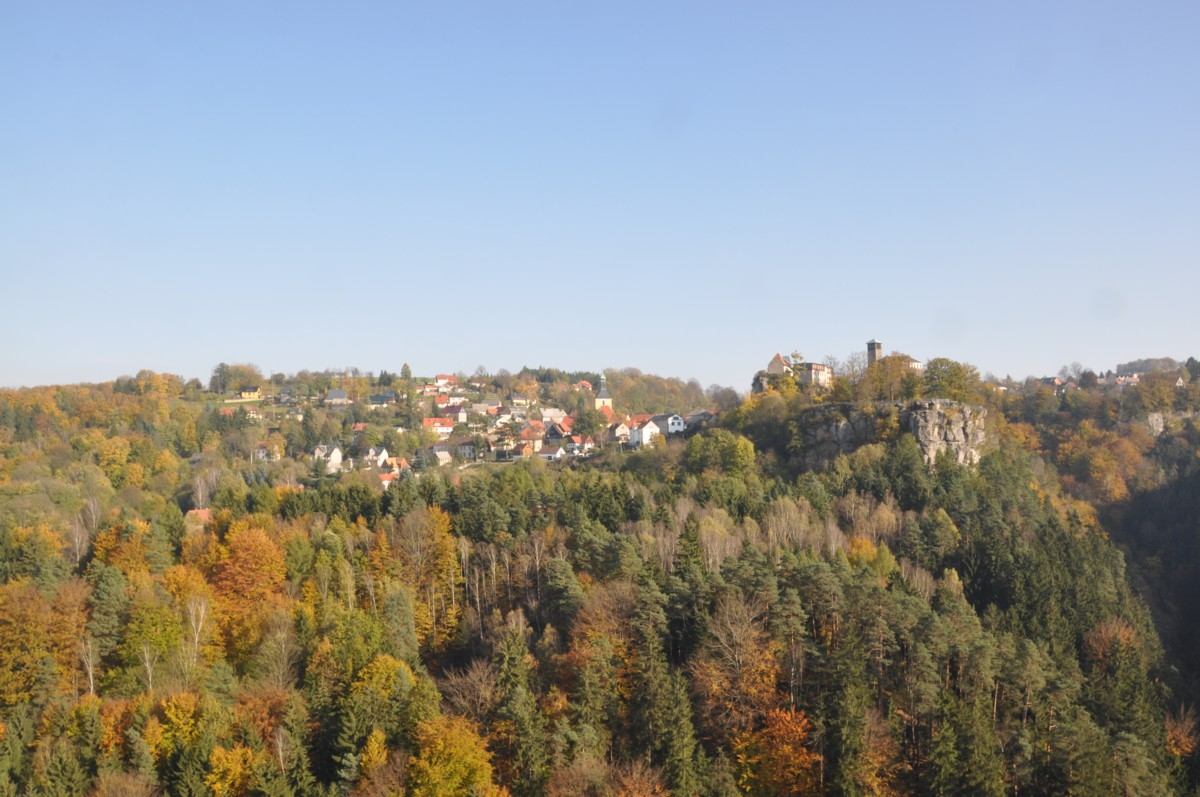 Blick auf die Stadt Hohnstein (Sächsische Schweiz) vom Aussichtspunkt Hockstein